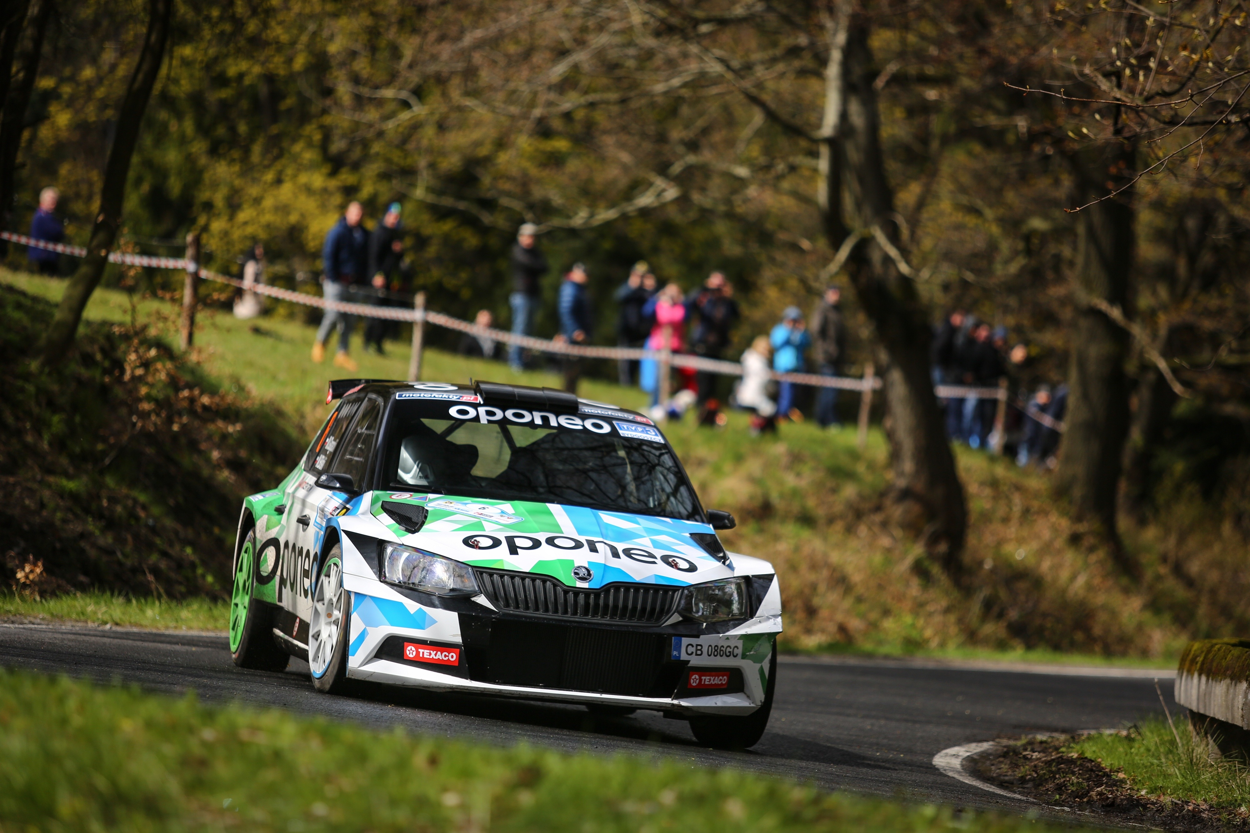 Duet Marcin Gagacki / Marcin Bilski podczas Rajdu Świdnickiego w 2017 roku.